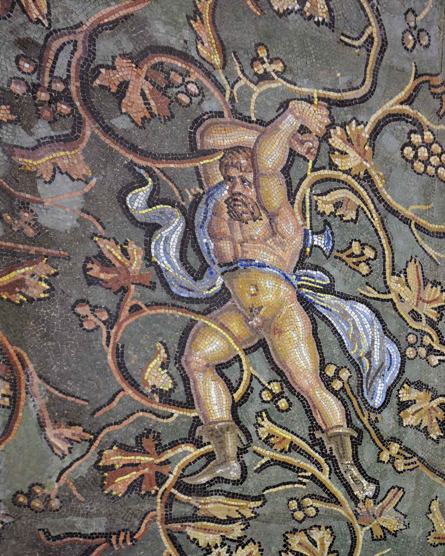 Le châtiment de Lycurgue (détail), grande mosaïque qui ornait une salle de réception, 2ème moitié du 2ème siècle, pierres et pâtes de verre bleues, découverte à Sainte-Colombe. Musée de Saint-Romain-en-Gal-Vienne.